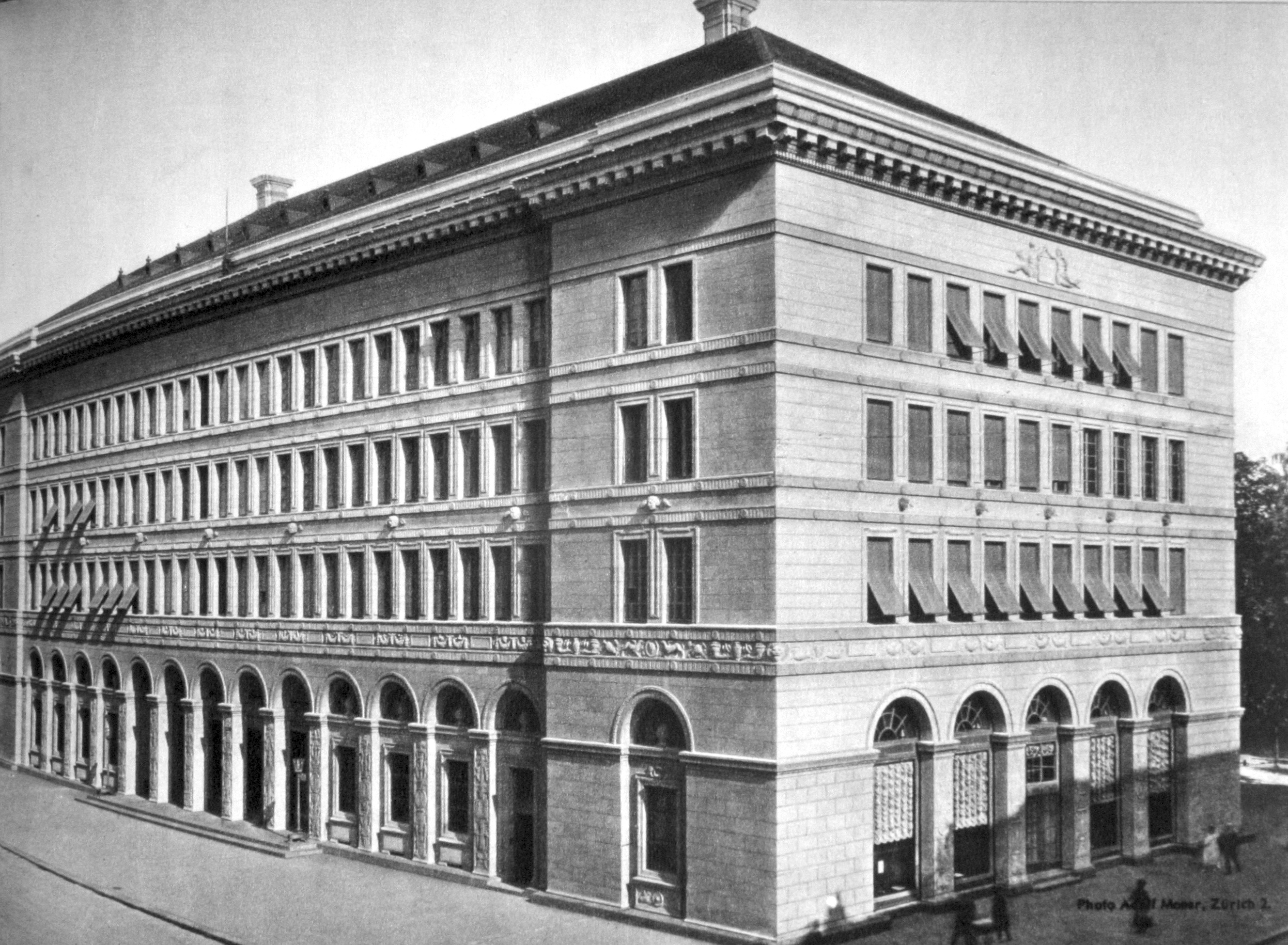 Gebäude der Schweizerischen Nationalbank in Zürich; erbaut 1919-1922 nach Entwurf der Architekten Gebrüder Pfister